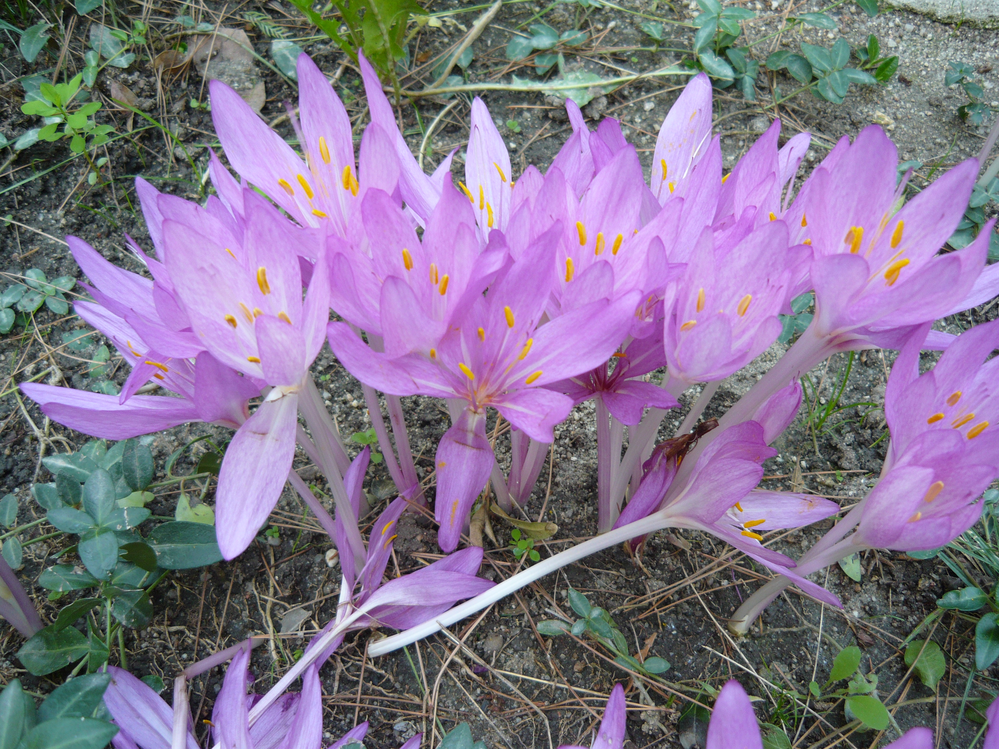 Colchicum autumnale. Real Jardín Botánico de Madrid